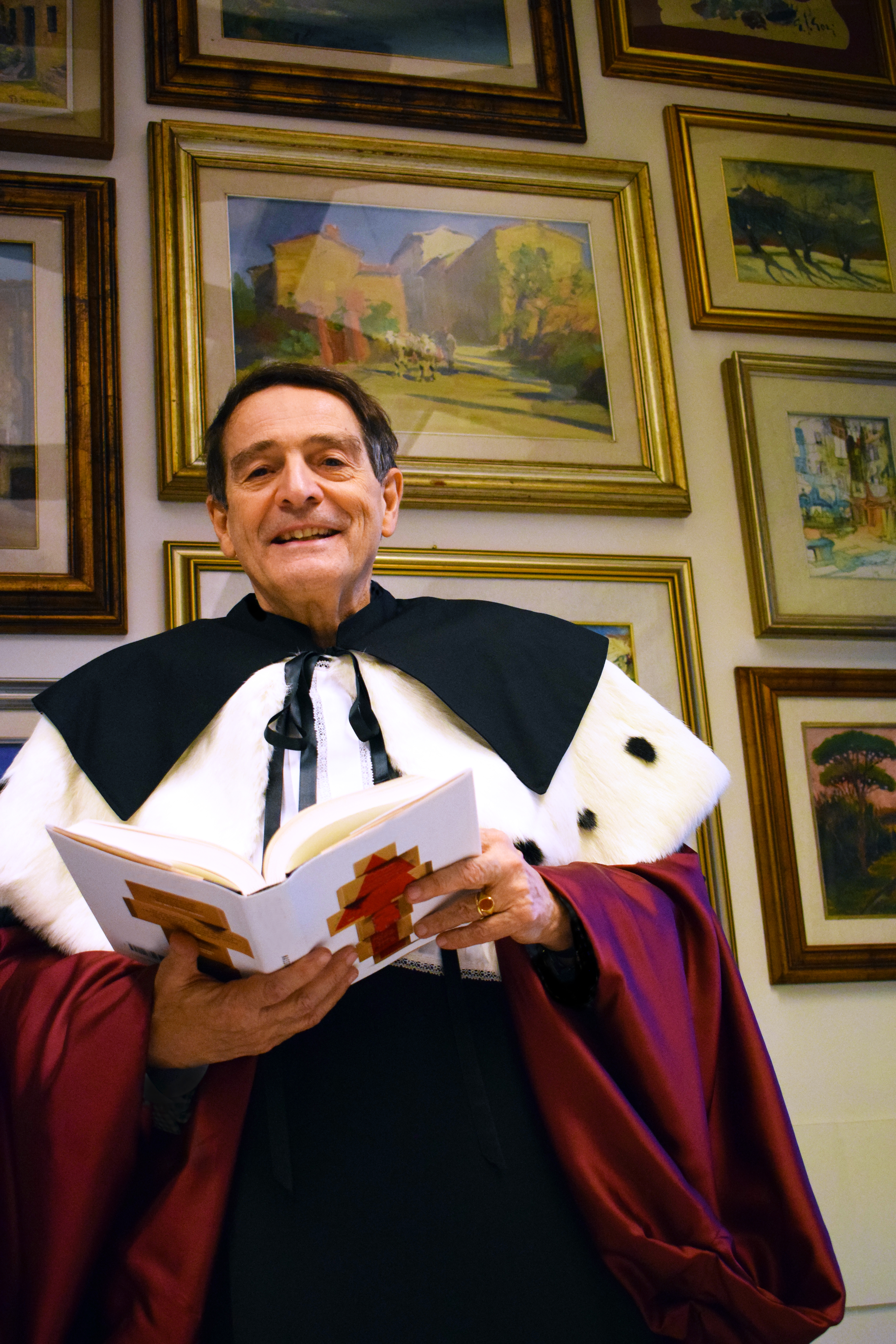 Letture e commento di un testo in una cerimonia pubblica